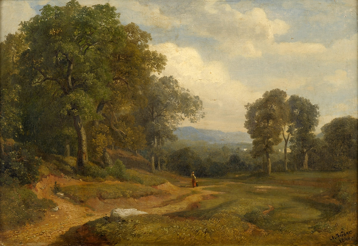 Bewaldete Sommerlandschaft mit Landvolk. Signiert. Datiert 1846. Öl/Lwd., 29 x 42 cm